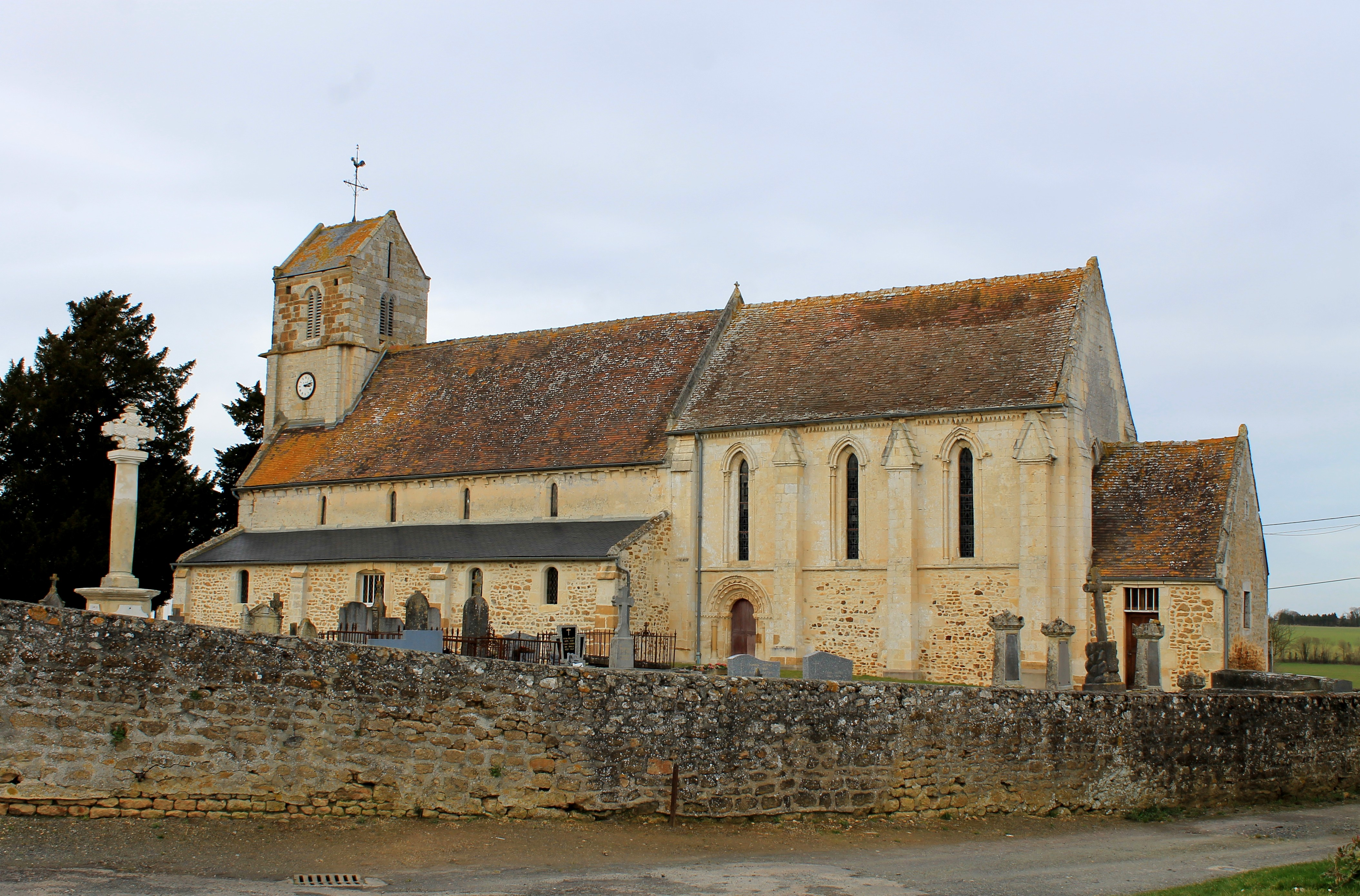 Église Saint-Aubin du XIIIe à Acqueville (Calvados)